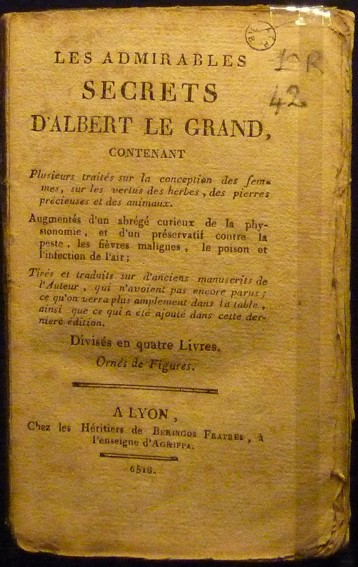 Page de couverture du livre "Les admirables secrets d'Albert Le Grand", censé avoir été édité en .. 6518 (en fait réédité à Lyon dans la première moitié du XIXe siècle).